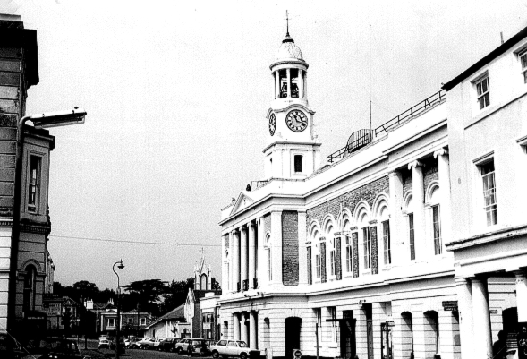 Townhall in Ryde, Isle of Wight